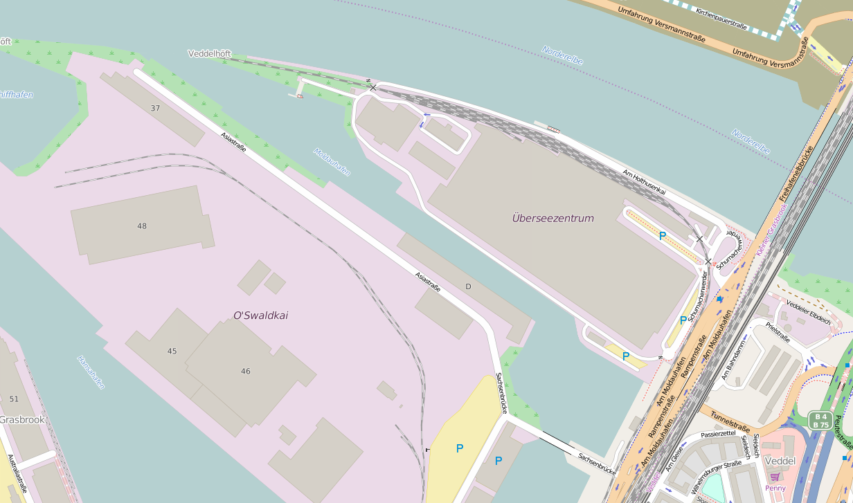 Carta di Moldauhafen This map may be incomplete, and may contain errors. Don't rely solely on it for navigation.